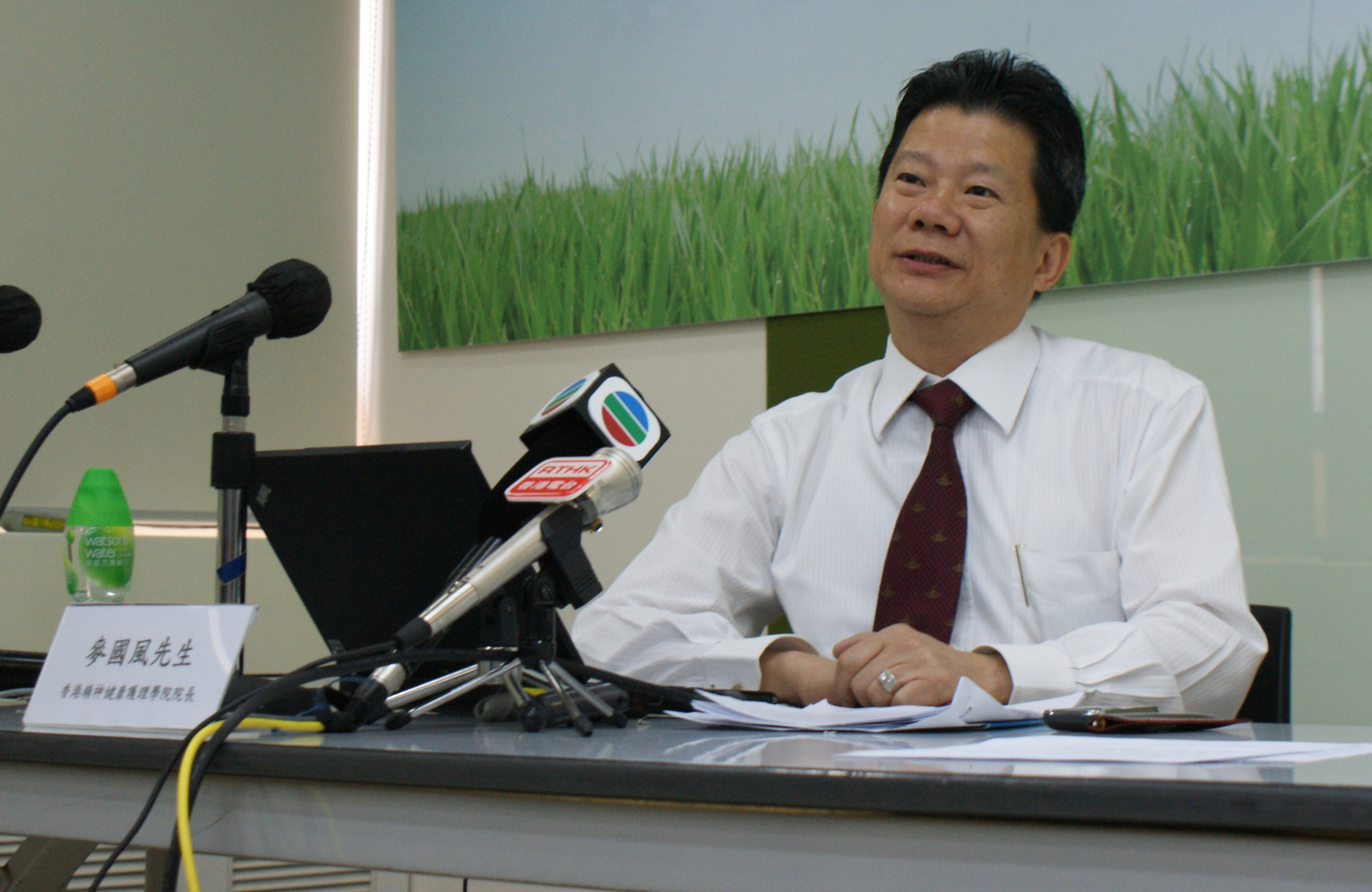 中文（香港）: 麥國風 Michael MAK